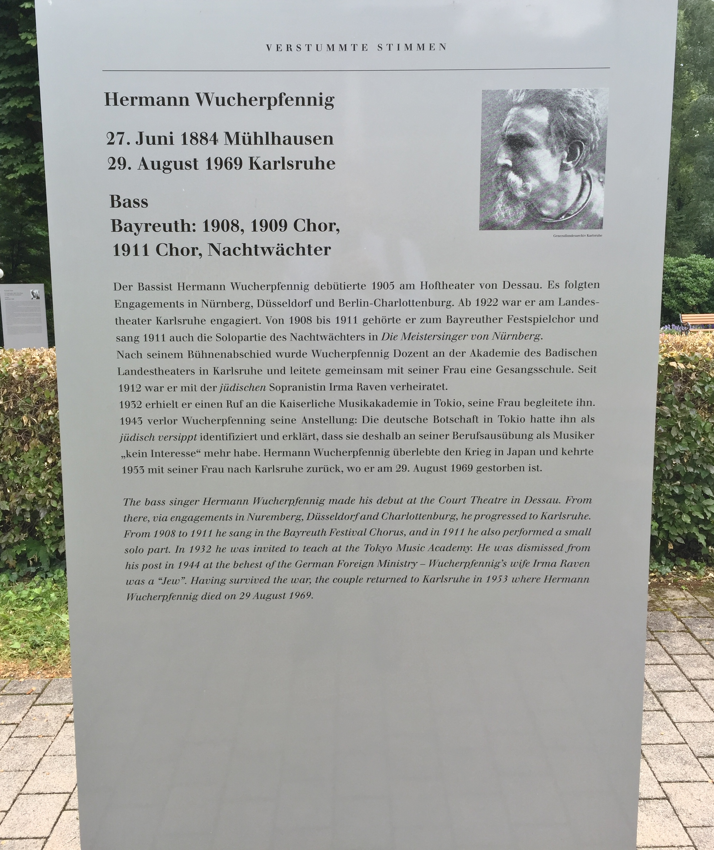 "Verstummte Stimmen - Die Bayreuther Festspiele und die 'Juden' 1876 bis 1945", Ausstellung 2016